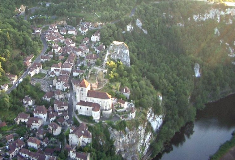 St Cirq Lapopie Statut Xavier Bonnafous